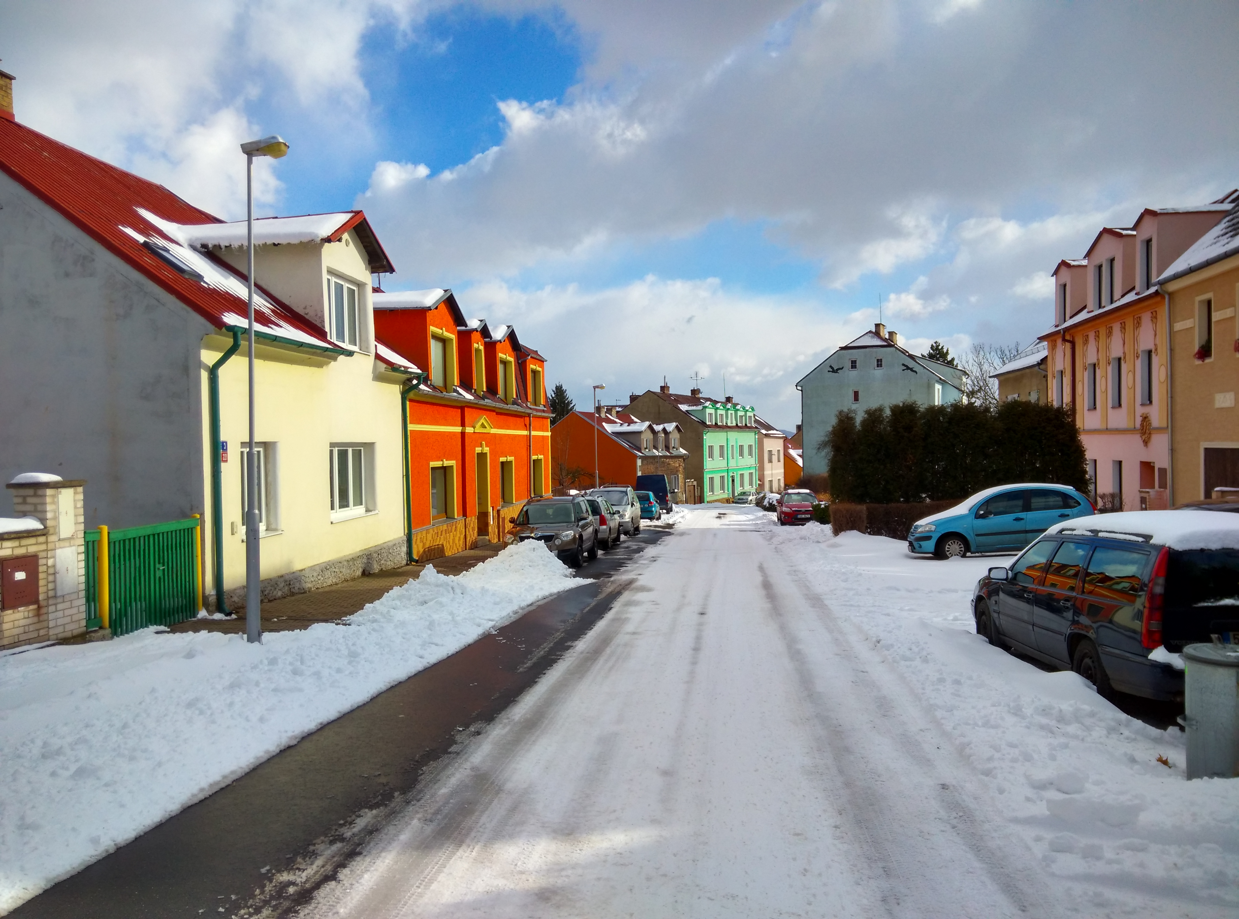 Dubí, Czech Republic